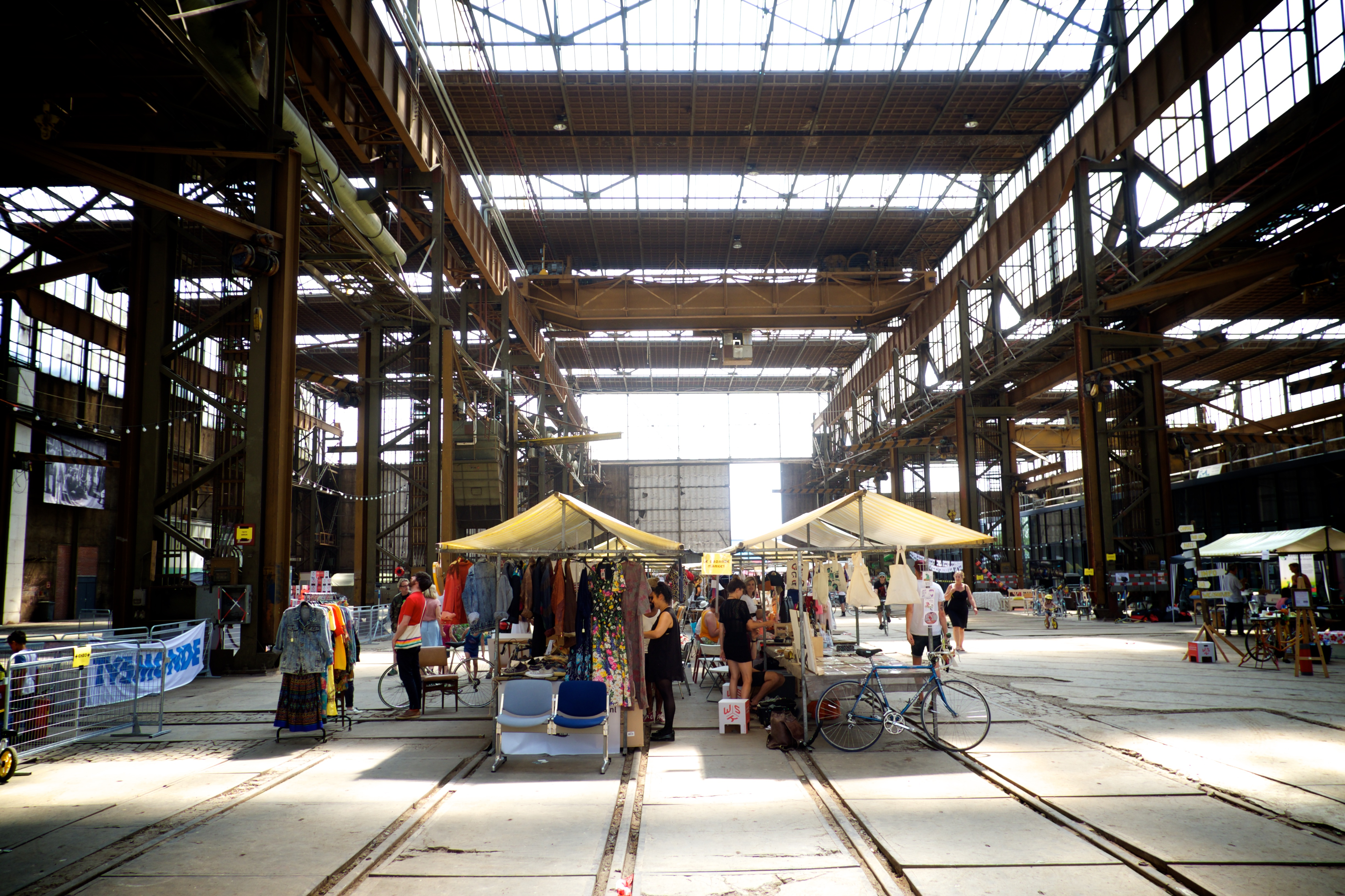 re-Cycle festival is een duurzaam fietsfestival met een bruisend recycle en fiets programma, een duurzame design markt, foodtrucks, live muziek, kunst, kidsarea en nog veel meer. Het festival wordt georganiseerd door Cycle Camping Cartesius tijdens de start van Le Tour de France in de Werkspoorkathedraal te Utrecht.